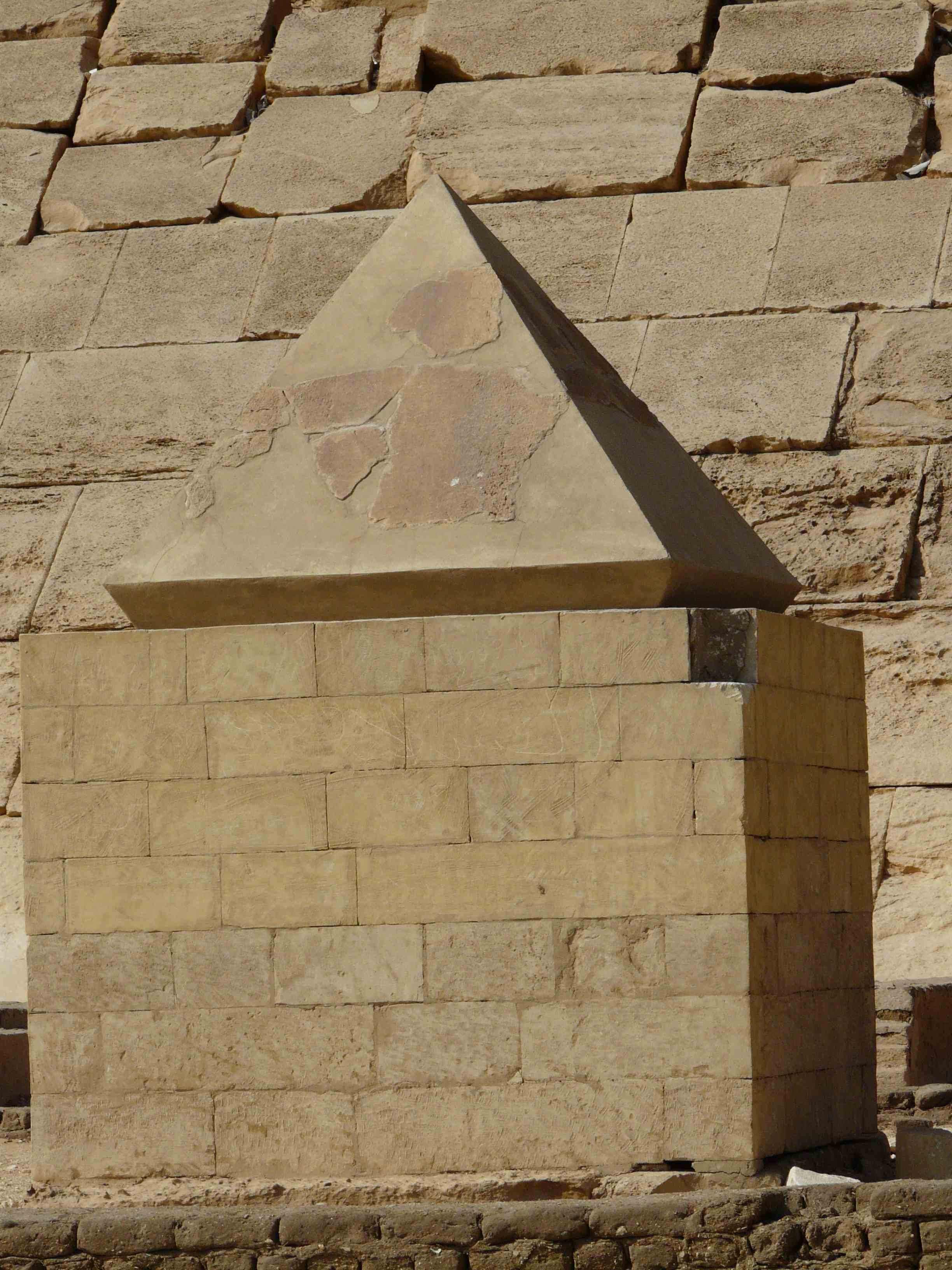 Dahchour - Pyramidion retrouvé sur le site exposé dans le temple haut de la pyramide rouge